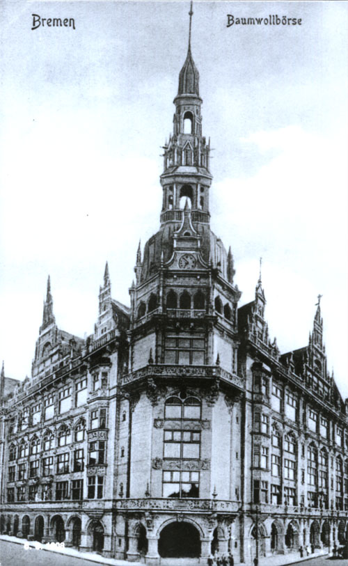 Baumwollbörse, Bremen, Germany